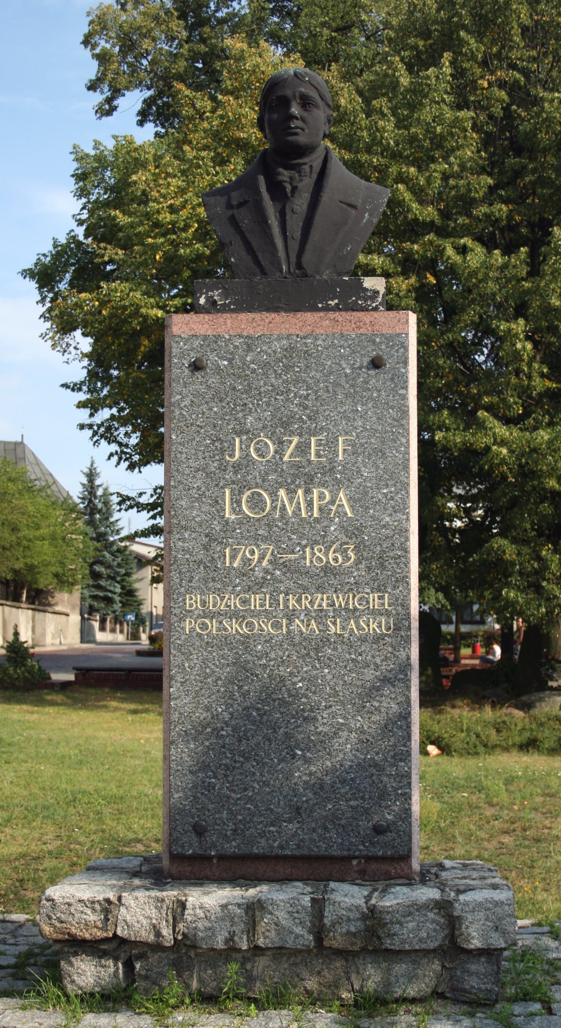 Pomnik Józefa Lompy na rynku w Woźnikach, powiat lubliniecki